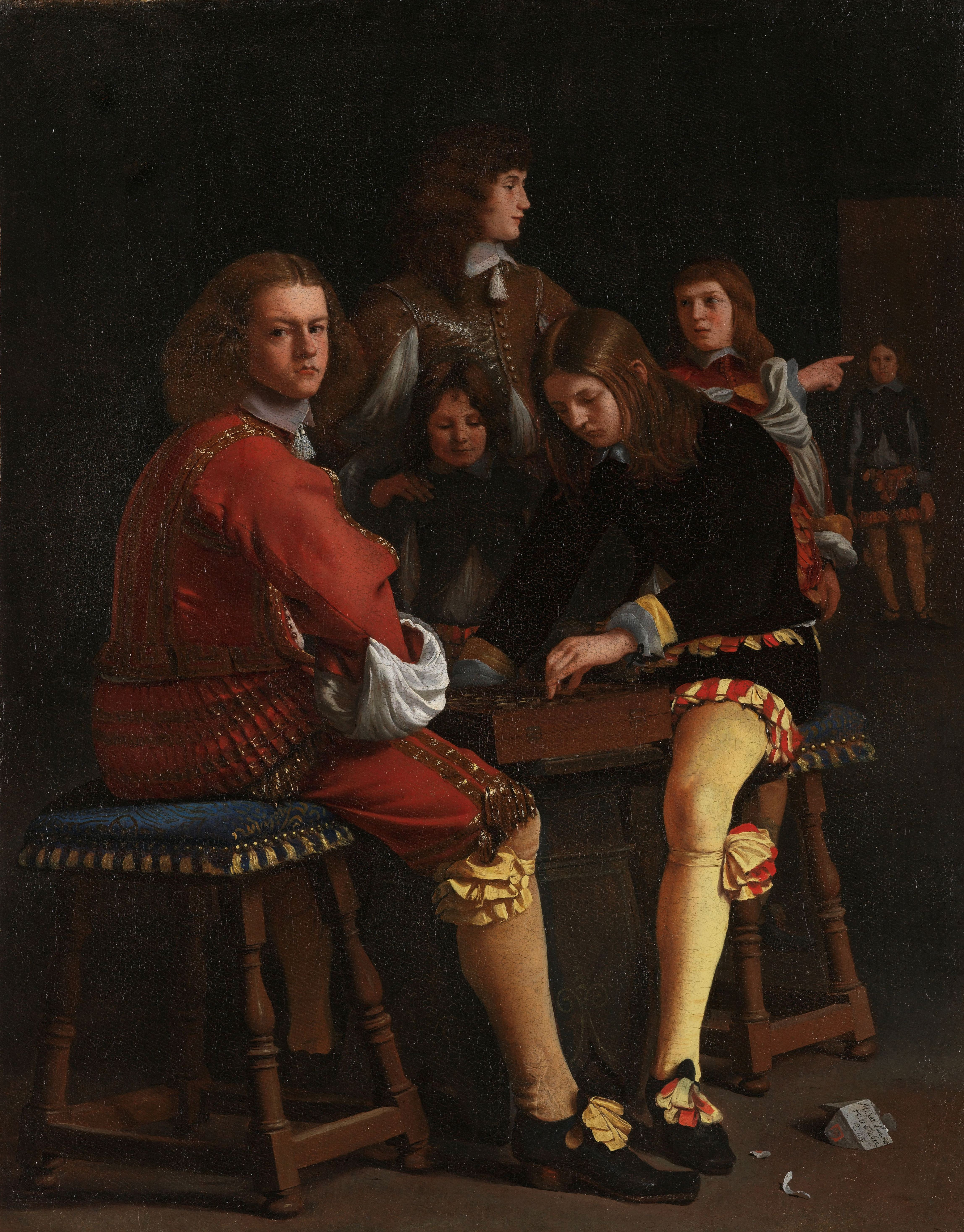 De damspelers. Groep van vijf jongens, twee zijn gezeten op bankjes bezig met een spelletje dammen.